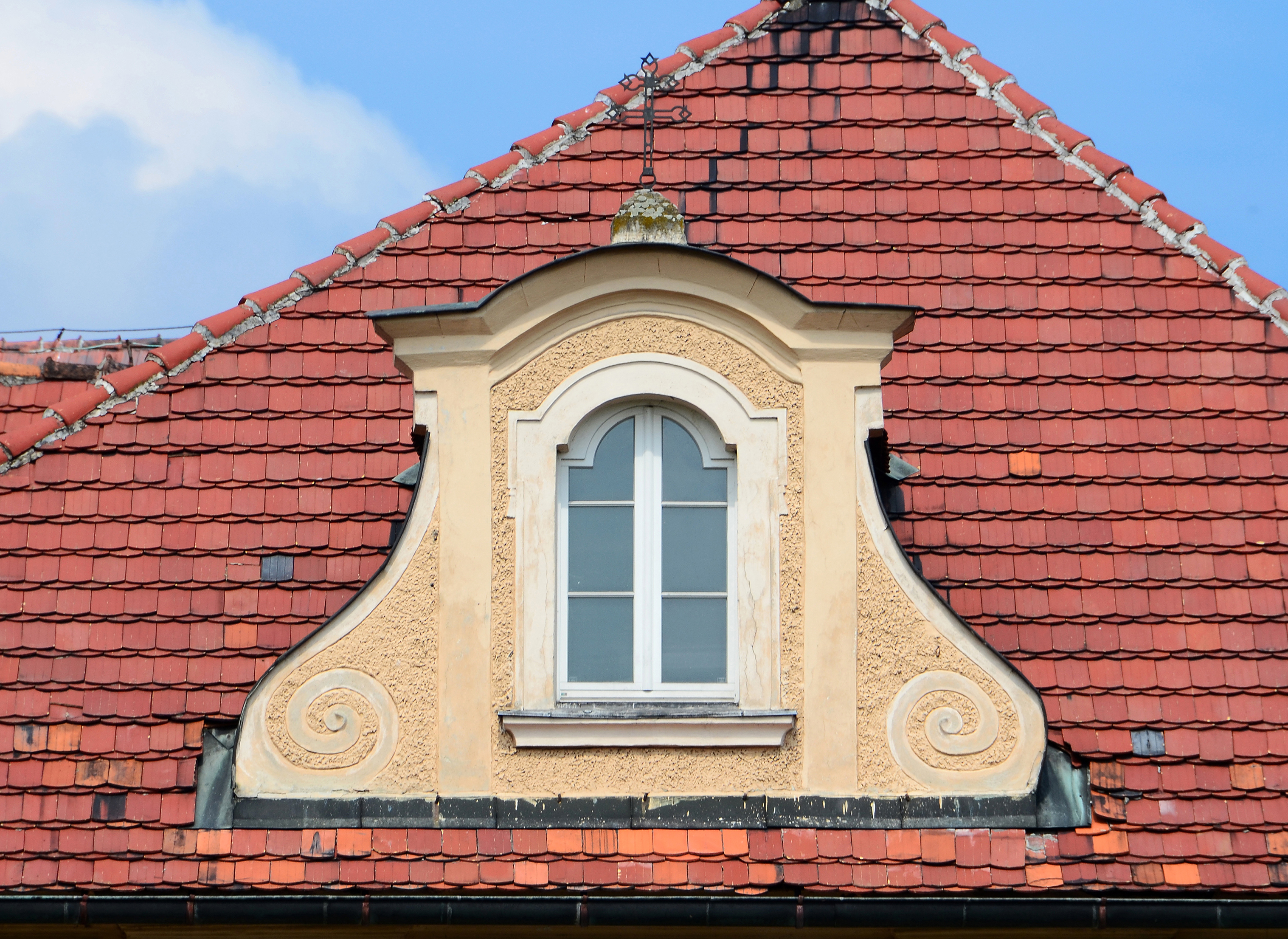 Kłodzko, zespół klasztorny franciszkanów, lukarna